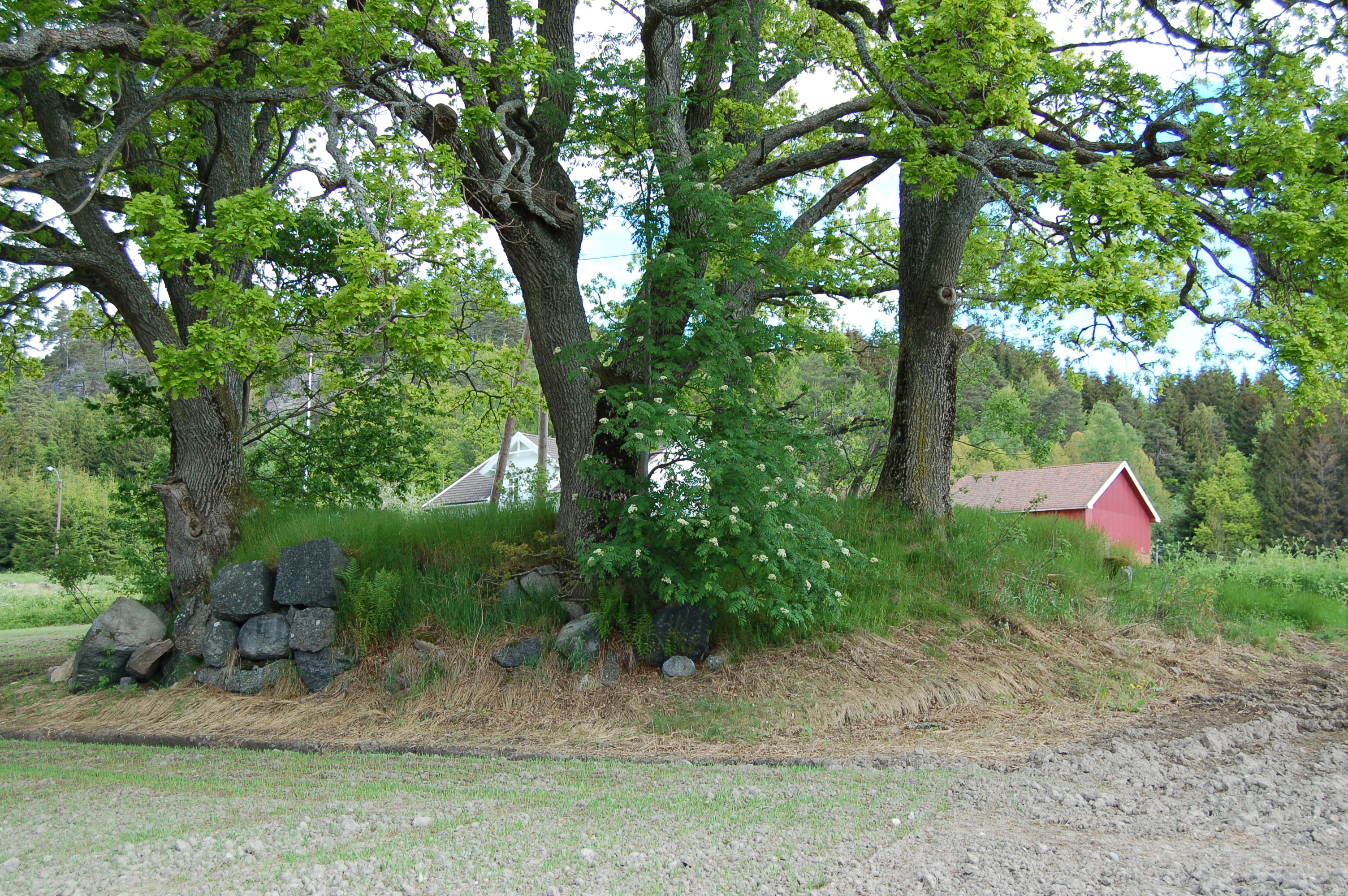 Akeleyelunden ved gården Roligheten i Larvik, jfr grev C. C. Danneskiold-Laurvig